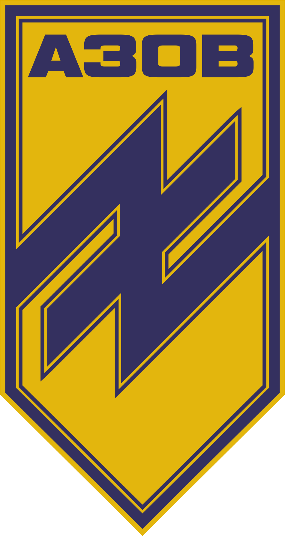 Обновленная эмблема полка «Азов», используемая с 11 августа 2015 года. Дизайнерским отделом полка на основе старой версии эмблемы было решено минимизировать количество символики на эмблеме и оставить один лишь символ «Идеи Нации», расположенный под углом, что символизирует резкое, стремительное движение вперёд.